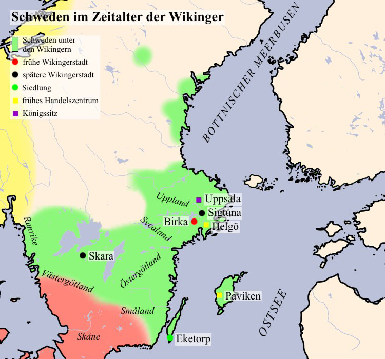 Schweden im Zeitalter der Wikinger, beschriftet